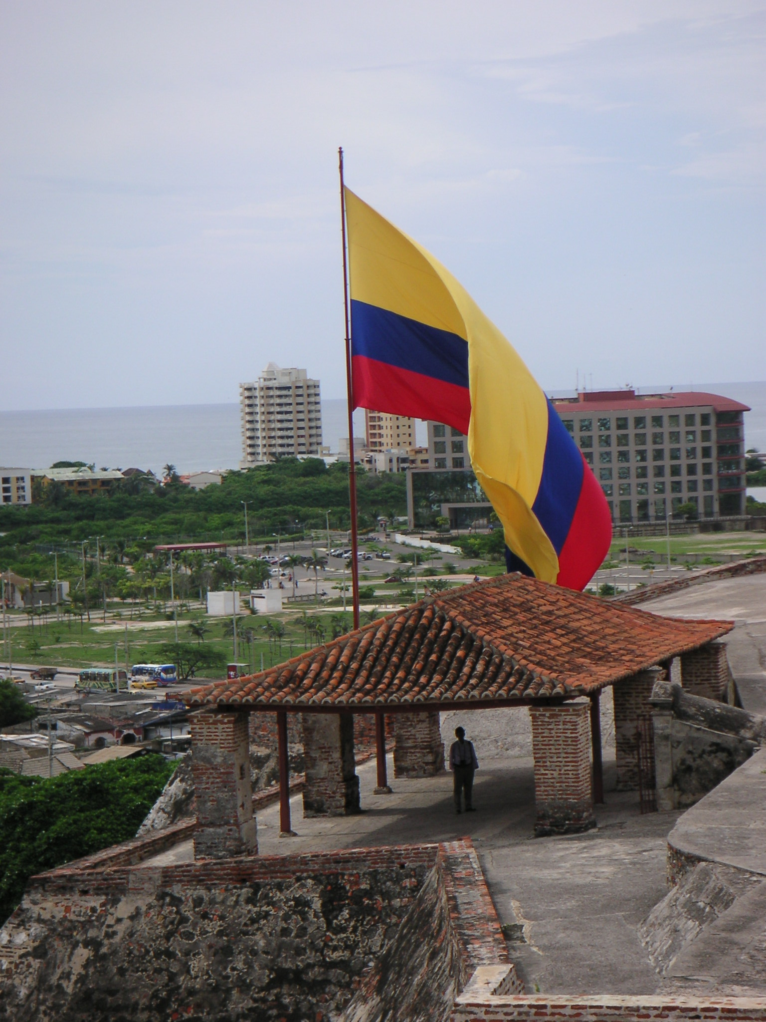 Description: Kolumbianische Flagge, Festung von Cartagena, Kolumbien Source: Louise Wolff (darina), June 2005